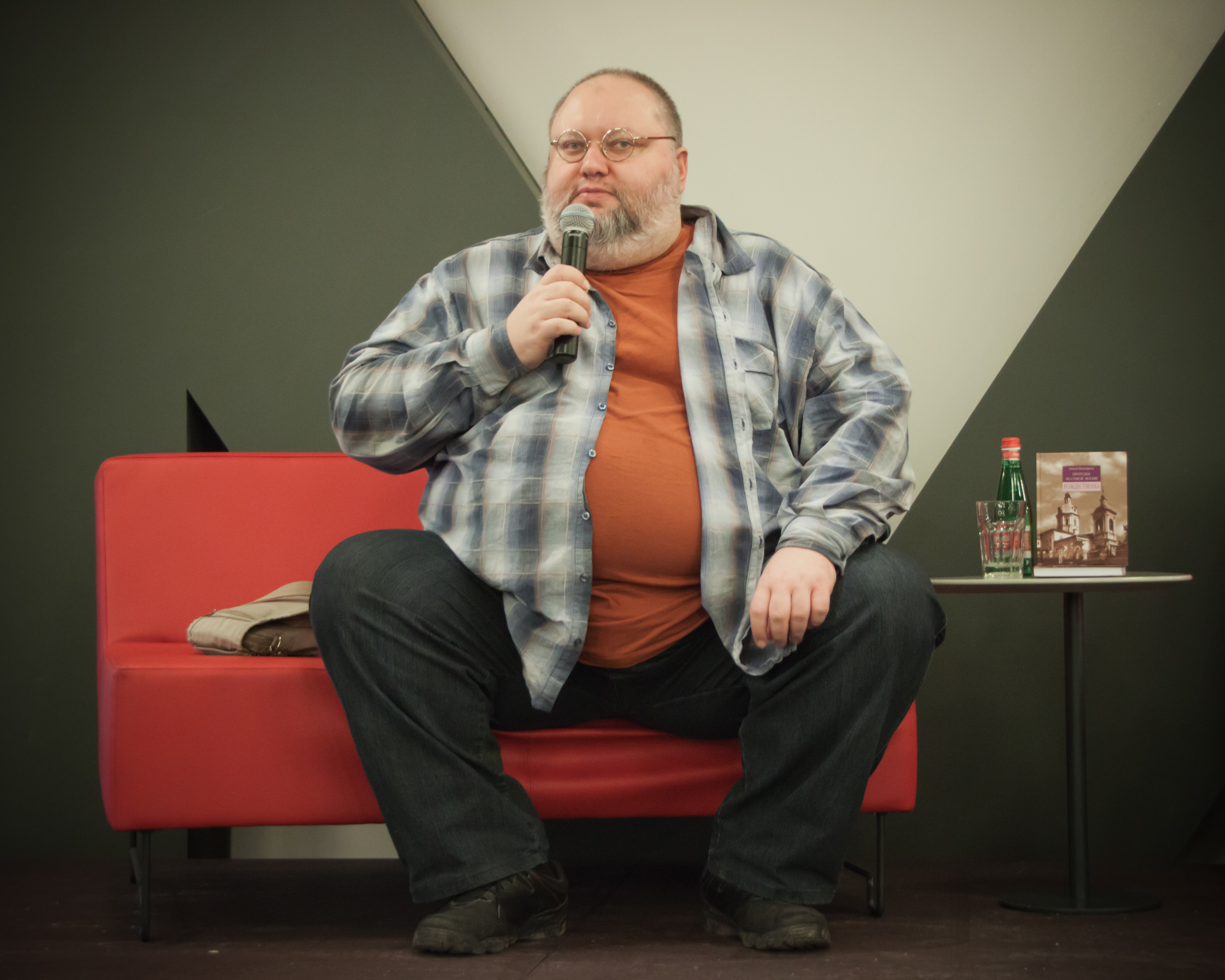 Алексей Геннадиевич Митрофанов - российский краевед, писатель, телеведущий